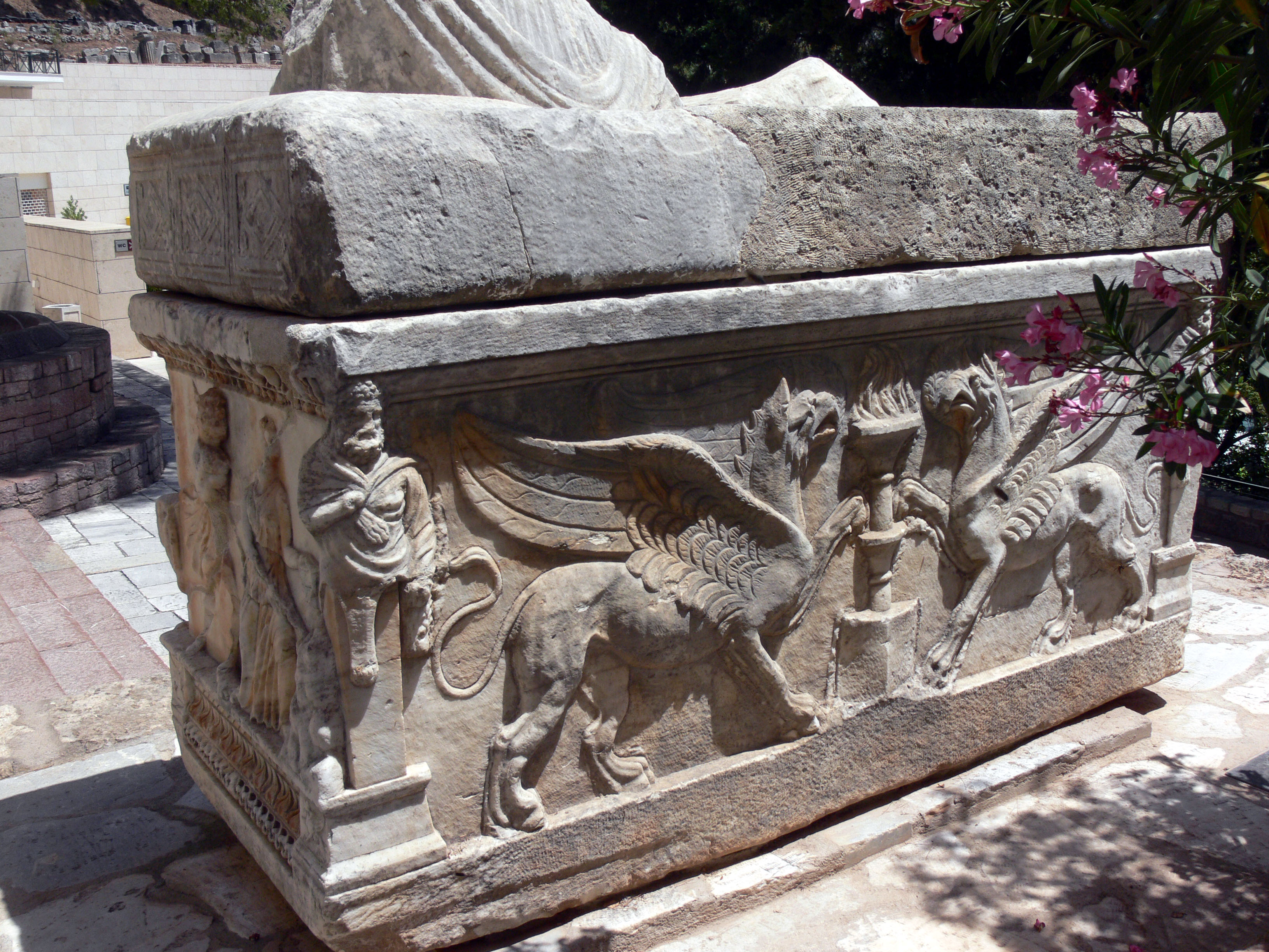 Römischer Sarkophag in Delphi